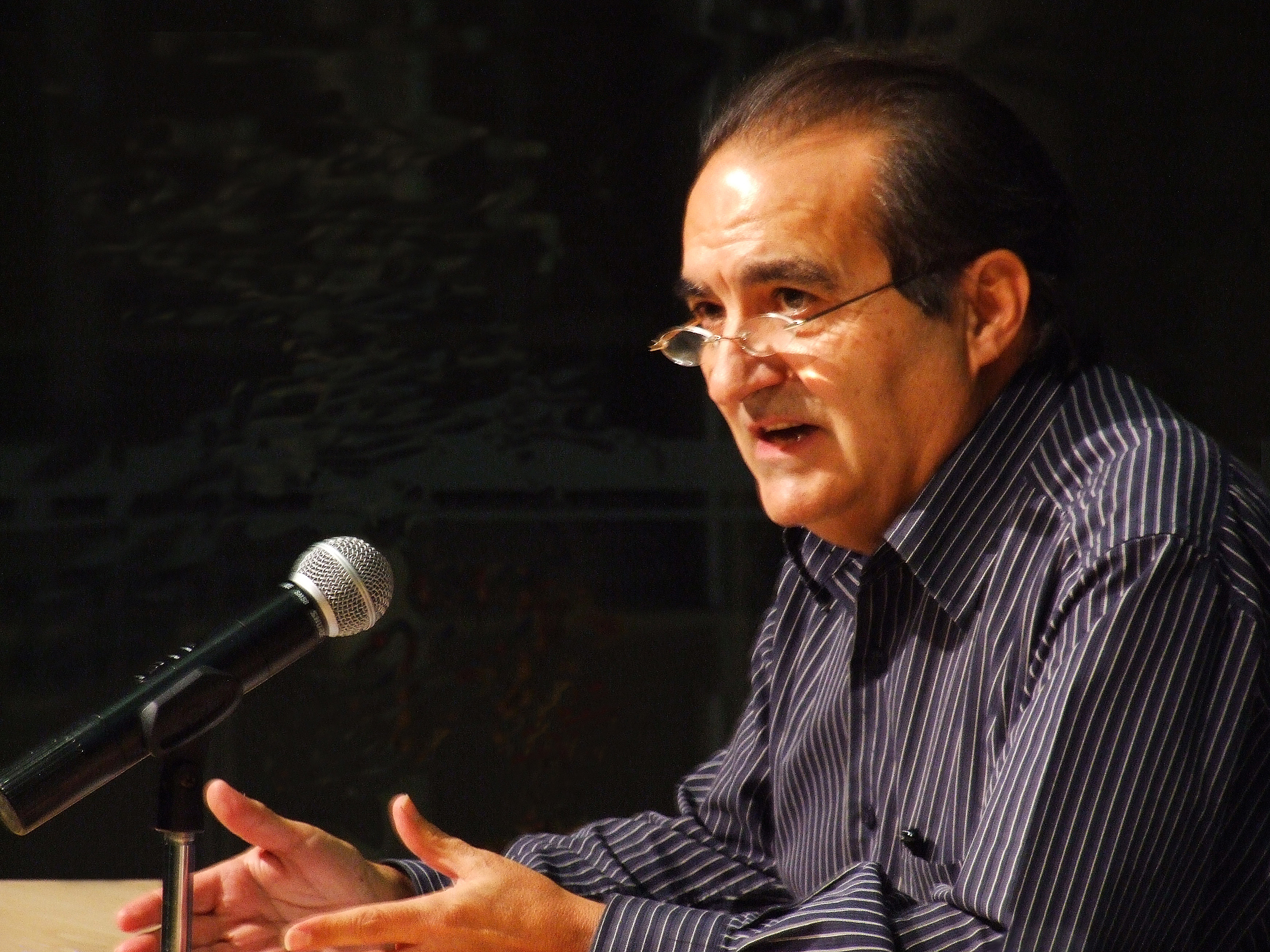 Imagen presidente de Europa Laica 2016